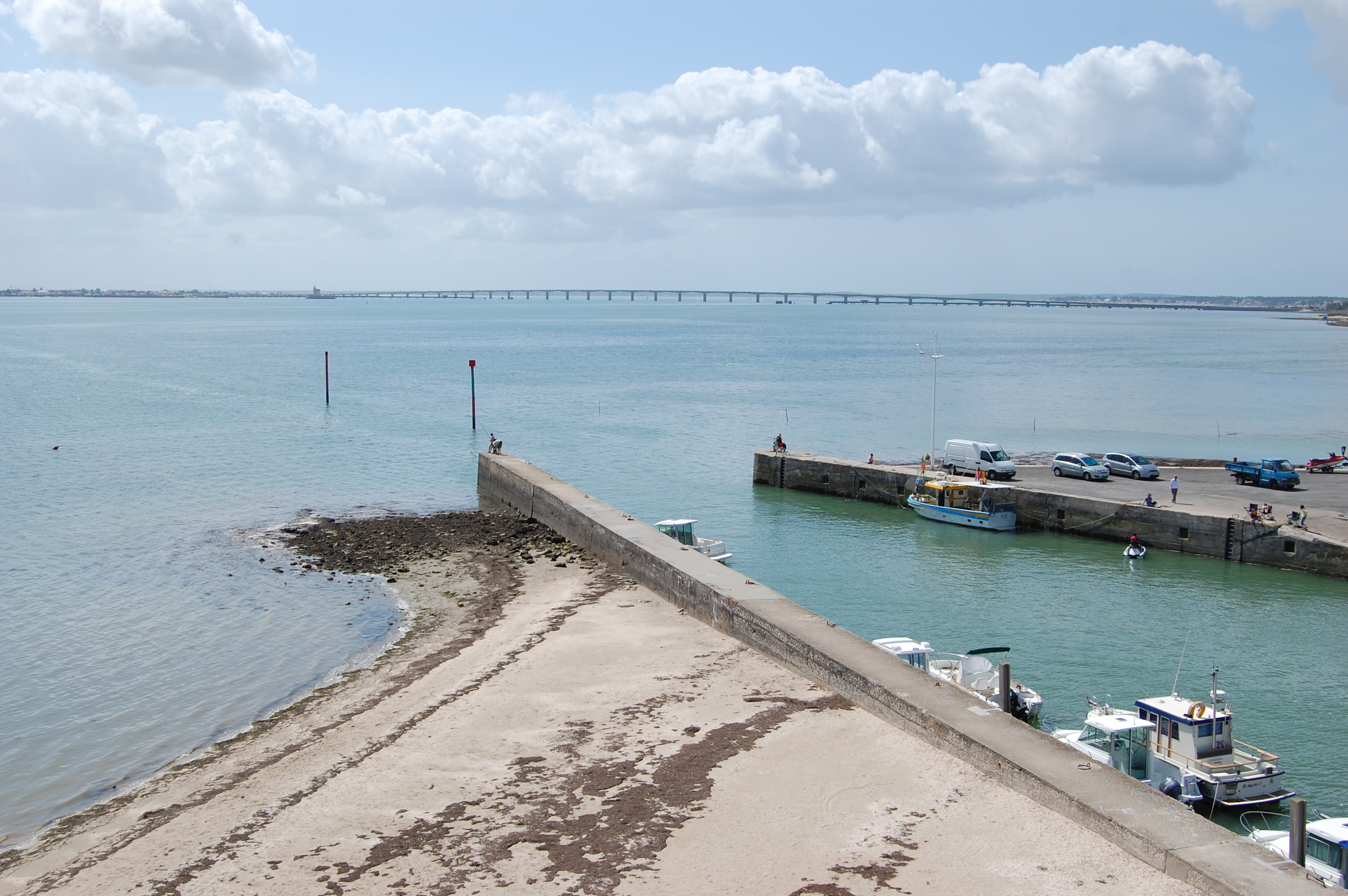 2009-07_Oleron_162